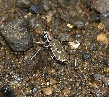 Cicindela elisae from Japan.